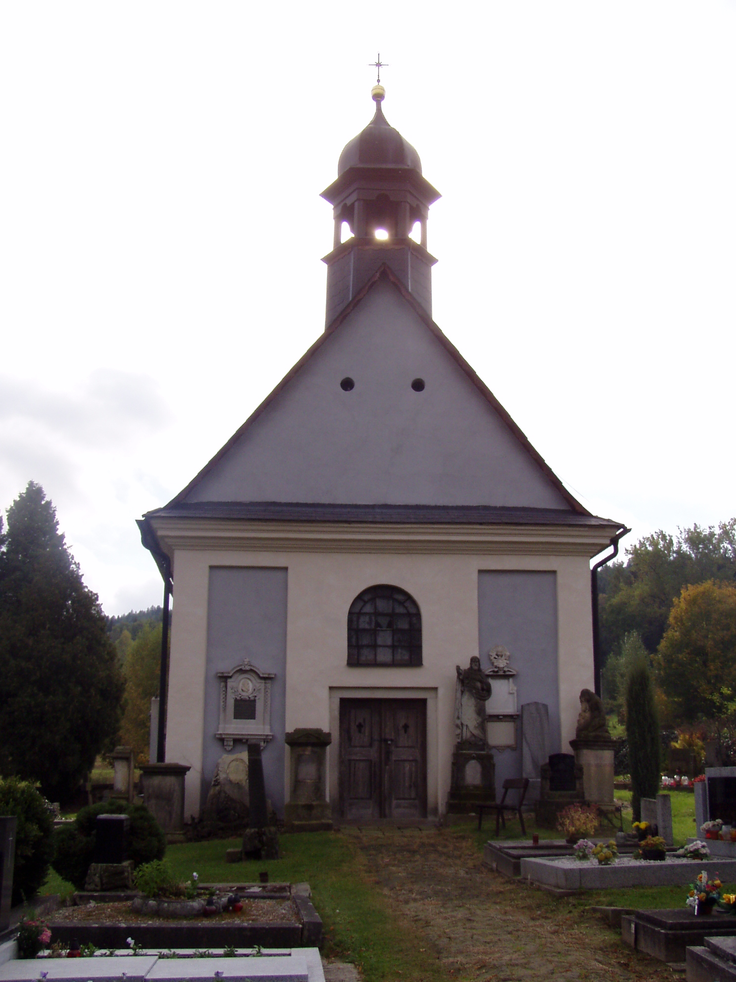 Žireč - kaple sv. Odilona1